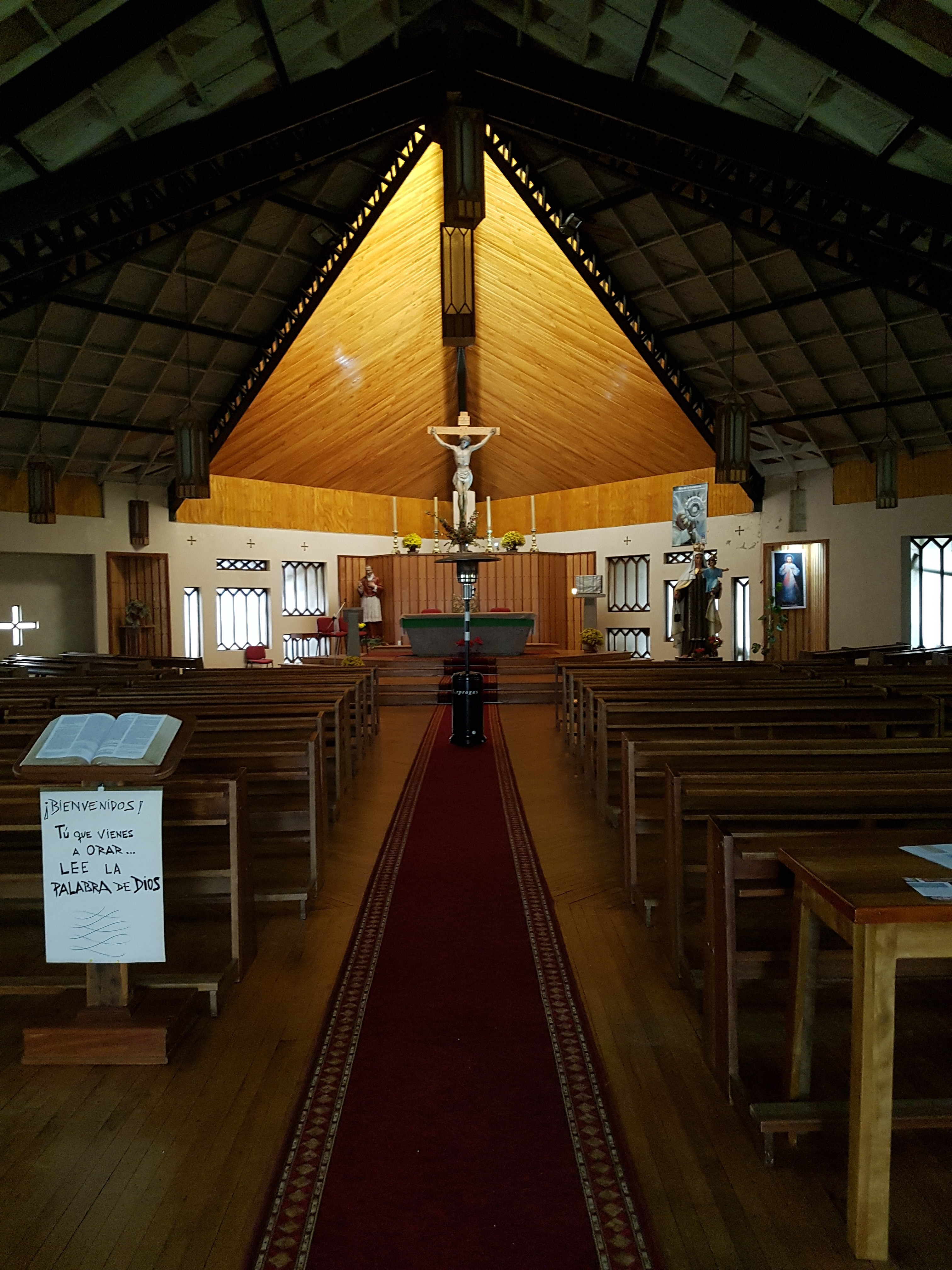 Interior de la catedral de Ancud ubicada en la plaza de armas de la ciudad